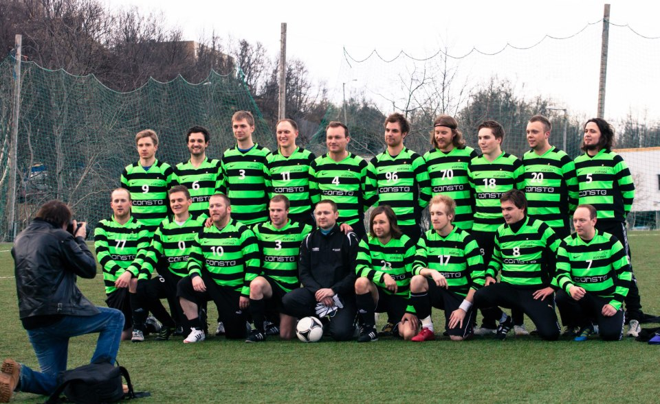 Første offisielle kamp for Kvæsma Fotballklubb, mot Stakkevollan 2 i 2012.